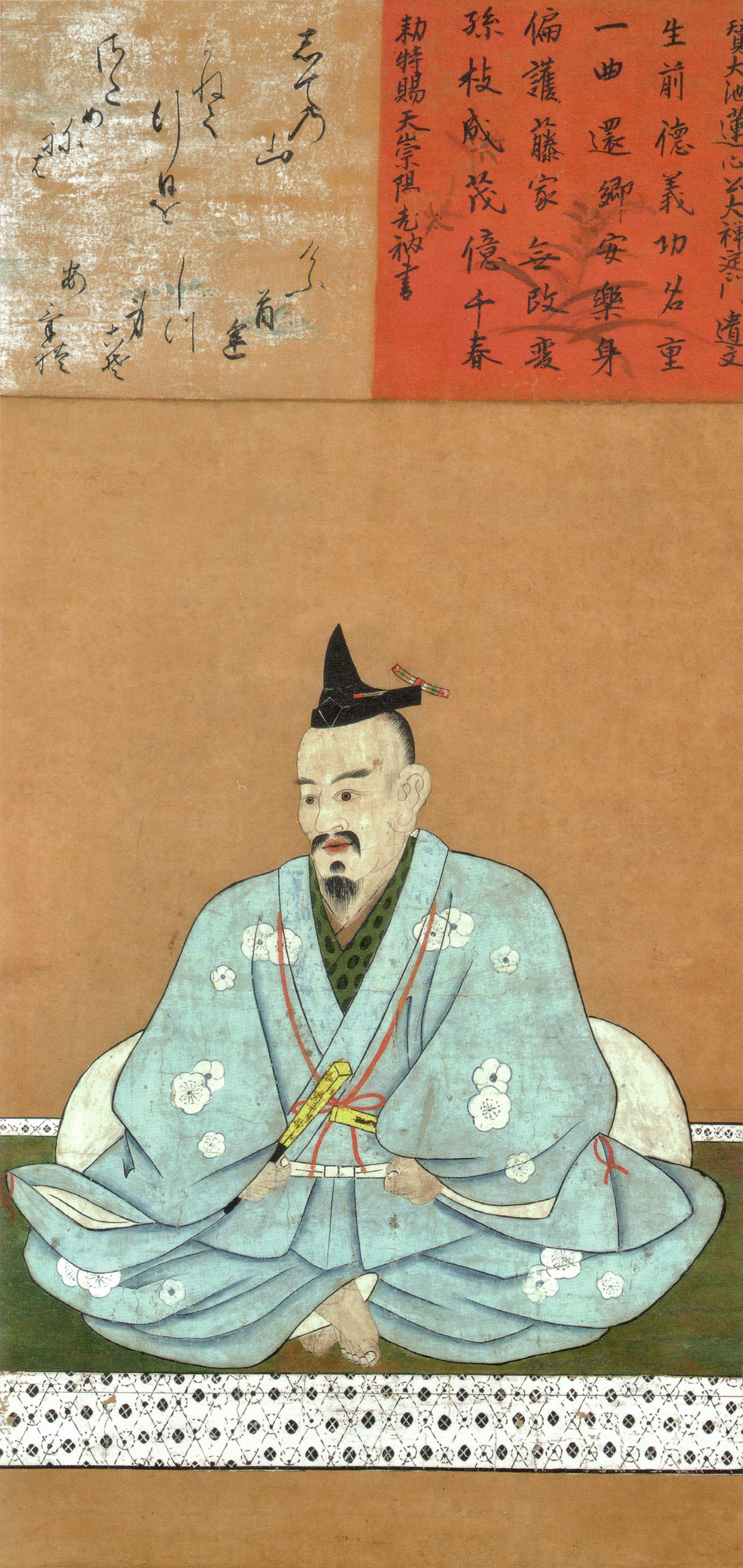 相良長毎像 （桃山時代-江戸時代前期製作）